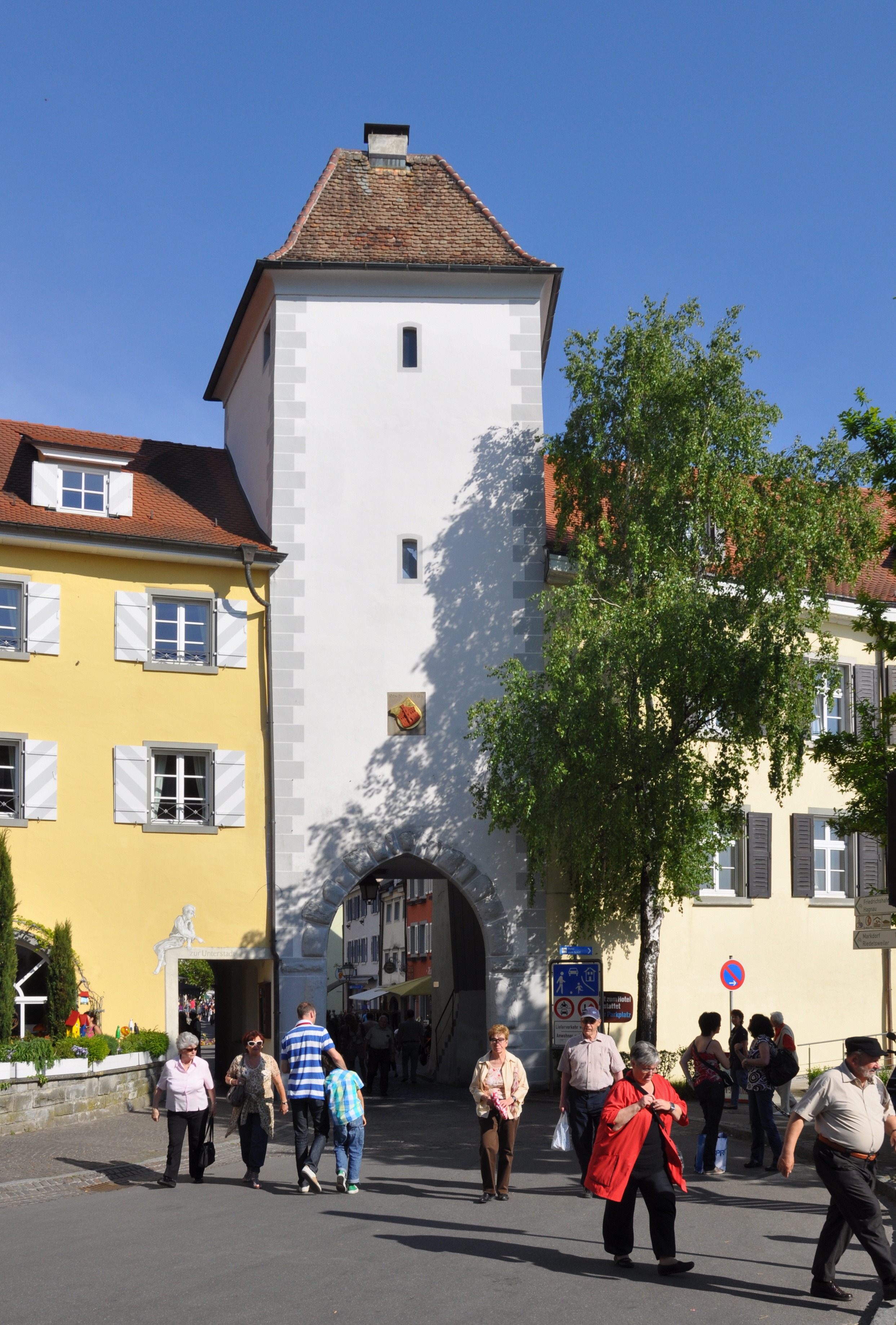 Meersburg, Unterstadt, Unterstadttor (Vorderes Seetor)